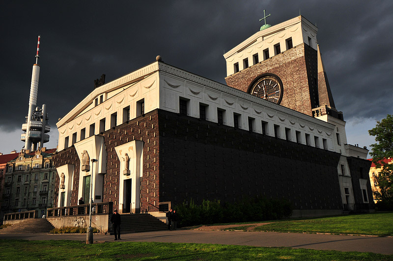 Eglise du Sacré coeur de Jésus, Prague